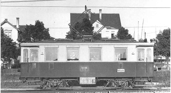 LAG elT 875